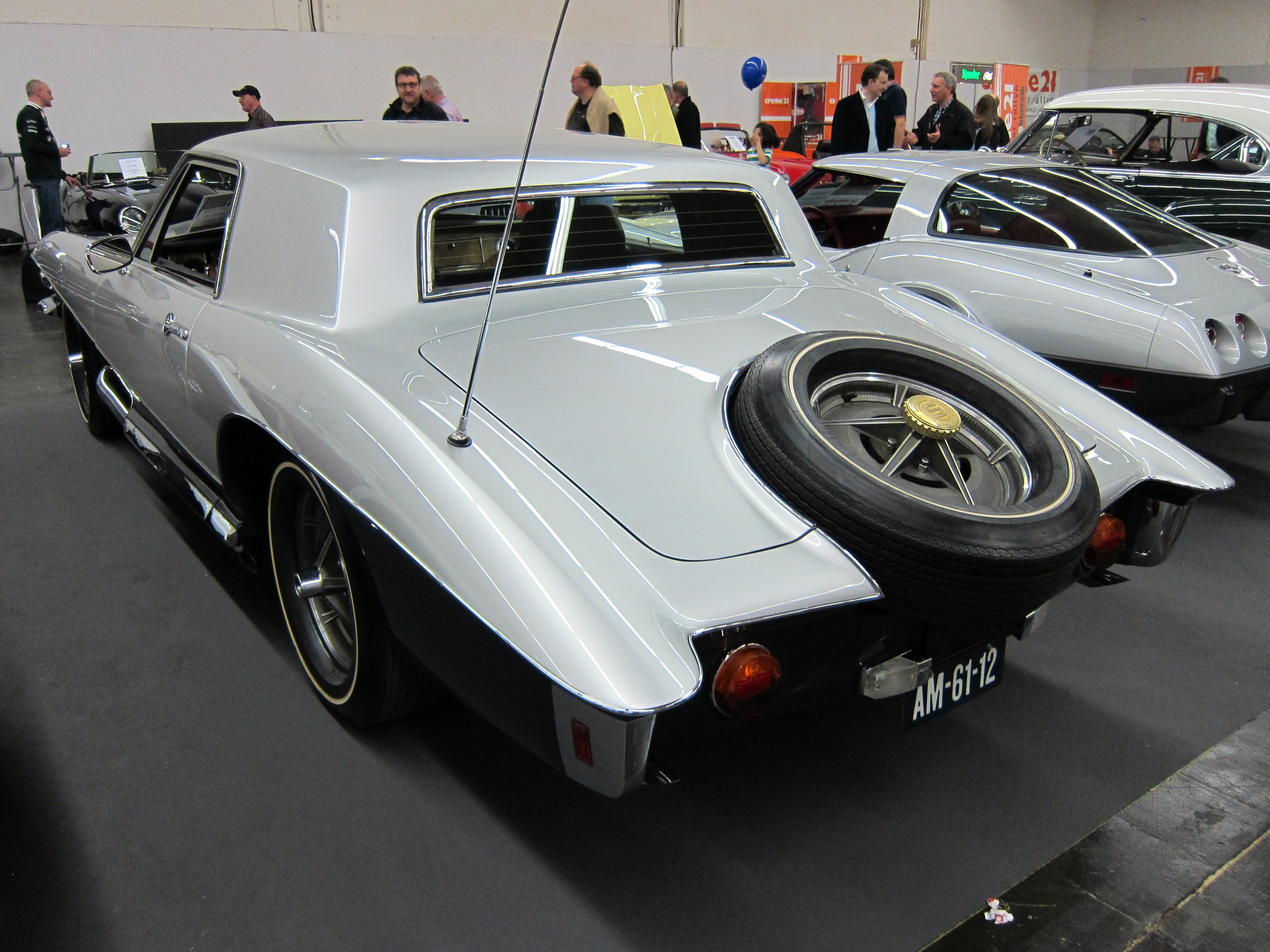 Techno Classica 2011